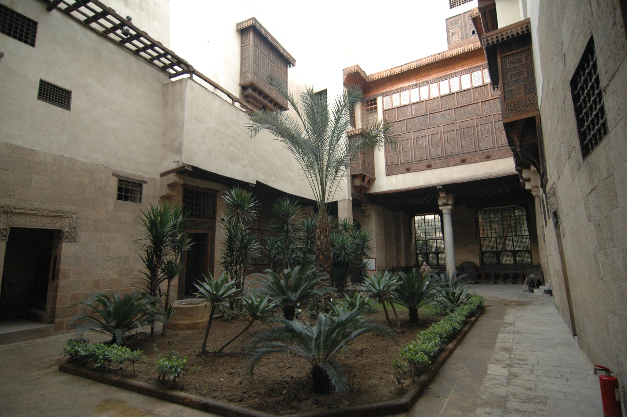 Cairo: Bayt es-Suhaimi